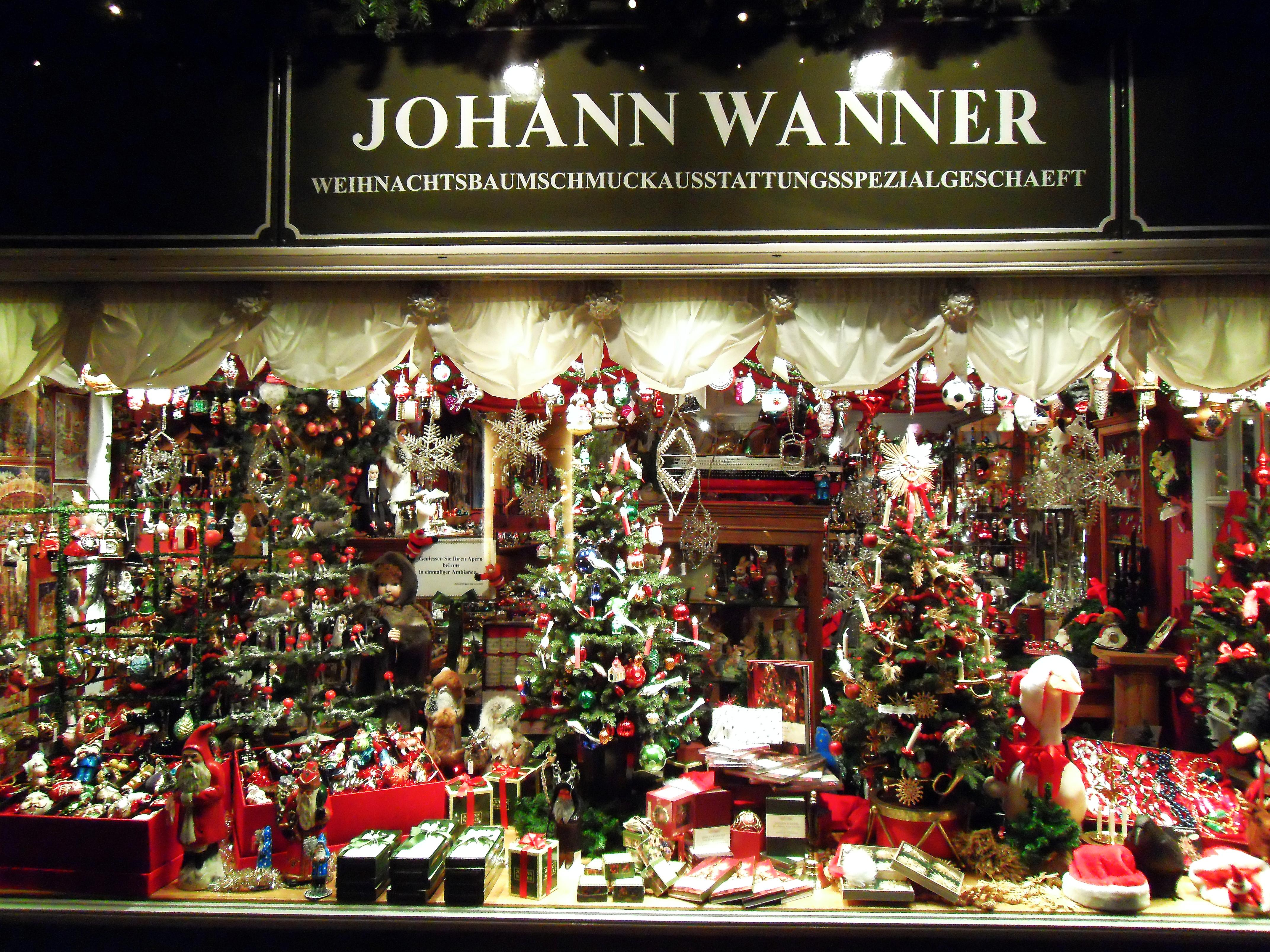 Johann Wanner Weihnachtsbaumschmuckausstattungsspezialgeschaeft, Basel, Schweiz.